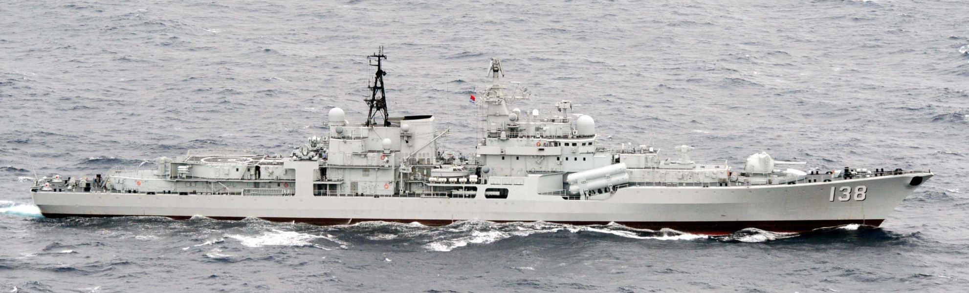 ８月１７日（月）午前８時頃、第１航空群所属「Ｐ－３Ｃ」（鹿屋）及び佐世保地方隊「あまくさ」（佐世保）が、下対馬の南西約１２０～１４０ｋｍの海域を北東進する中国海軍ルージョウ級ミサイル駆逐艦１隻、ソブレメンヌイII級ミサイル駆逐艦１隻、ジャンカイII級フリゲート２隻、ユージャオ級揚陸艦１隻、ユーチンII級揚陸艦１隻、フチ級補給艦１隻の合計７隻を確認した。その後、当該艦艇が対馬海峡を北上したことを確認した。